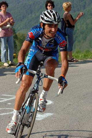 Afbeelding van Giampaolo Caruso. afkomstig van website van Liberty seguros. Afbeelding is "free for use".